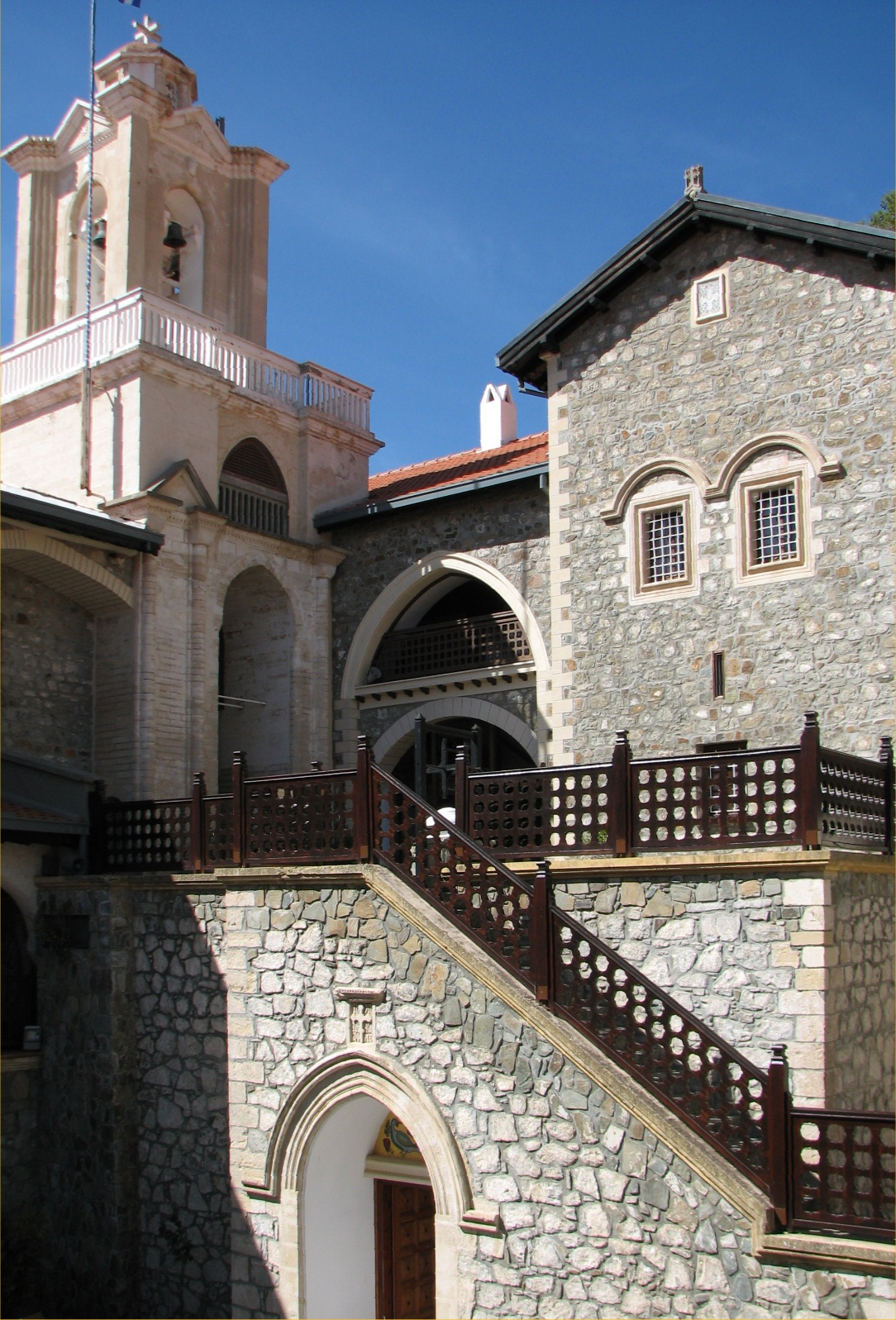 Kykkos Monastery